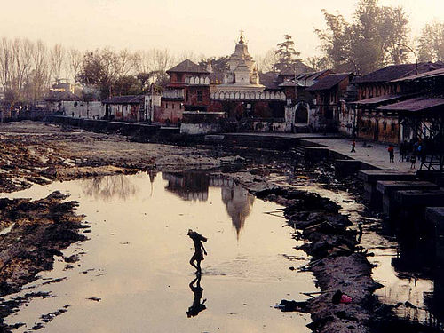 Bagmati River, Pashupatinath, Nepal